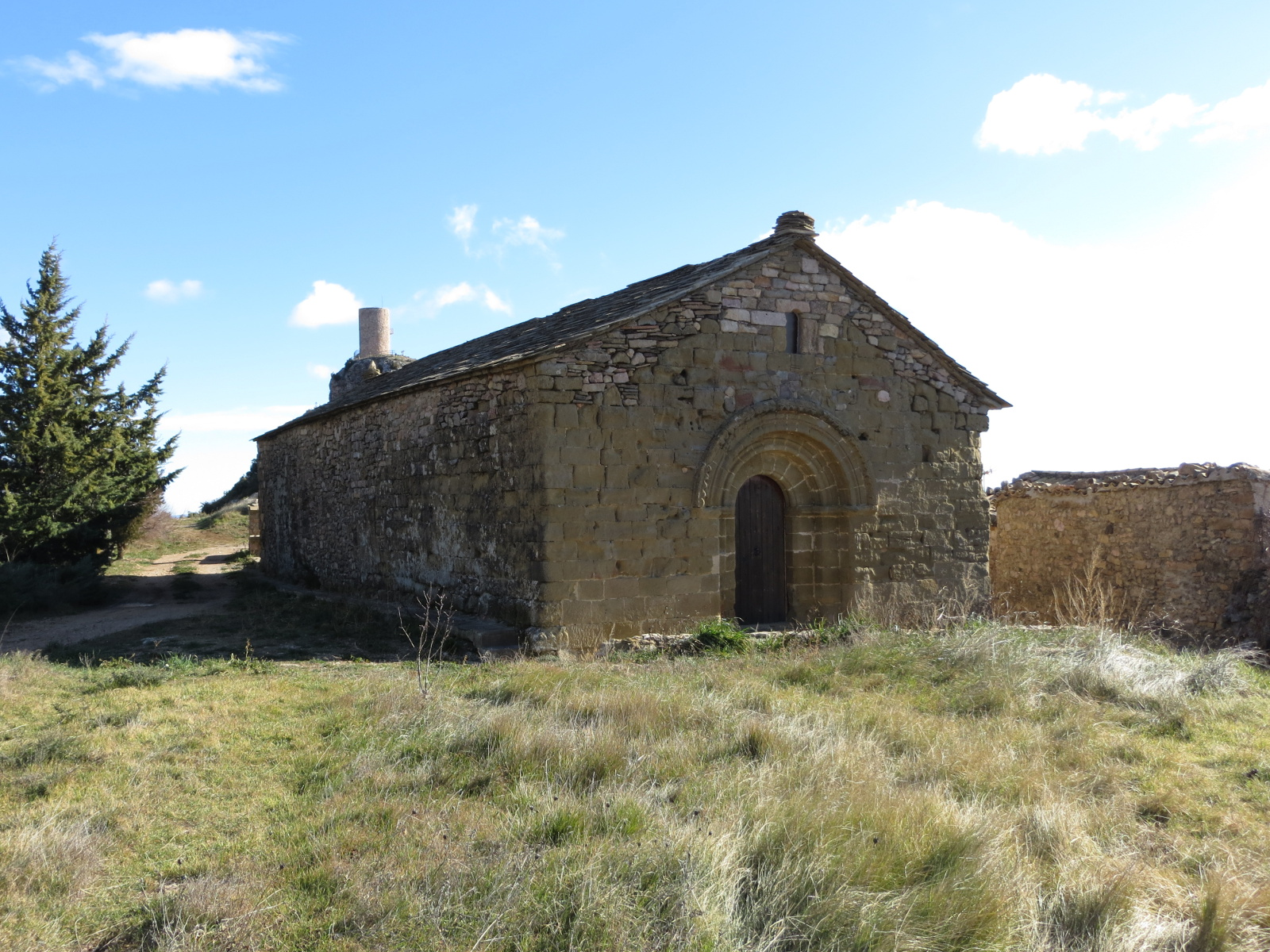 Vista de la ermita de Nuestra Señora de Sescún, en Santa Eulalia la Mayor